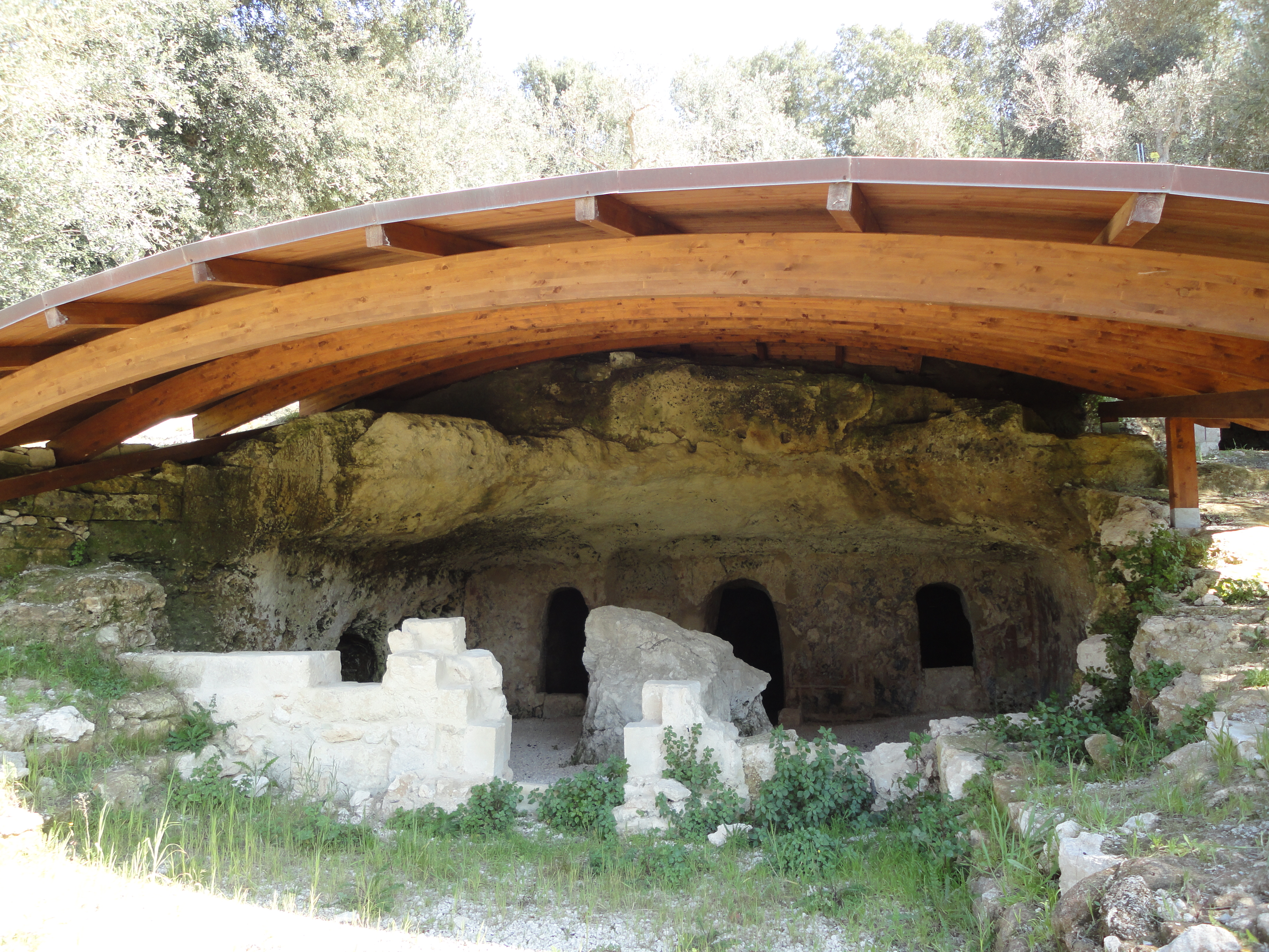 Cripta sant'Angelo Casamassella